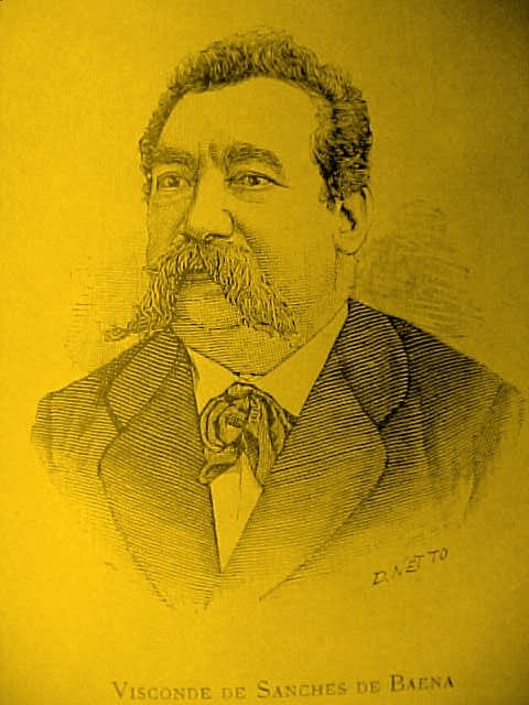 Visconde de Sanches de Baena - gravura - Revista O Occidente - Lisboa - sÃ©culo XIX